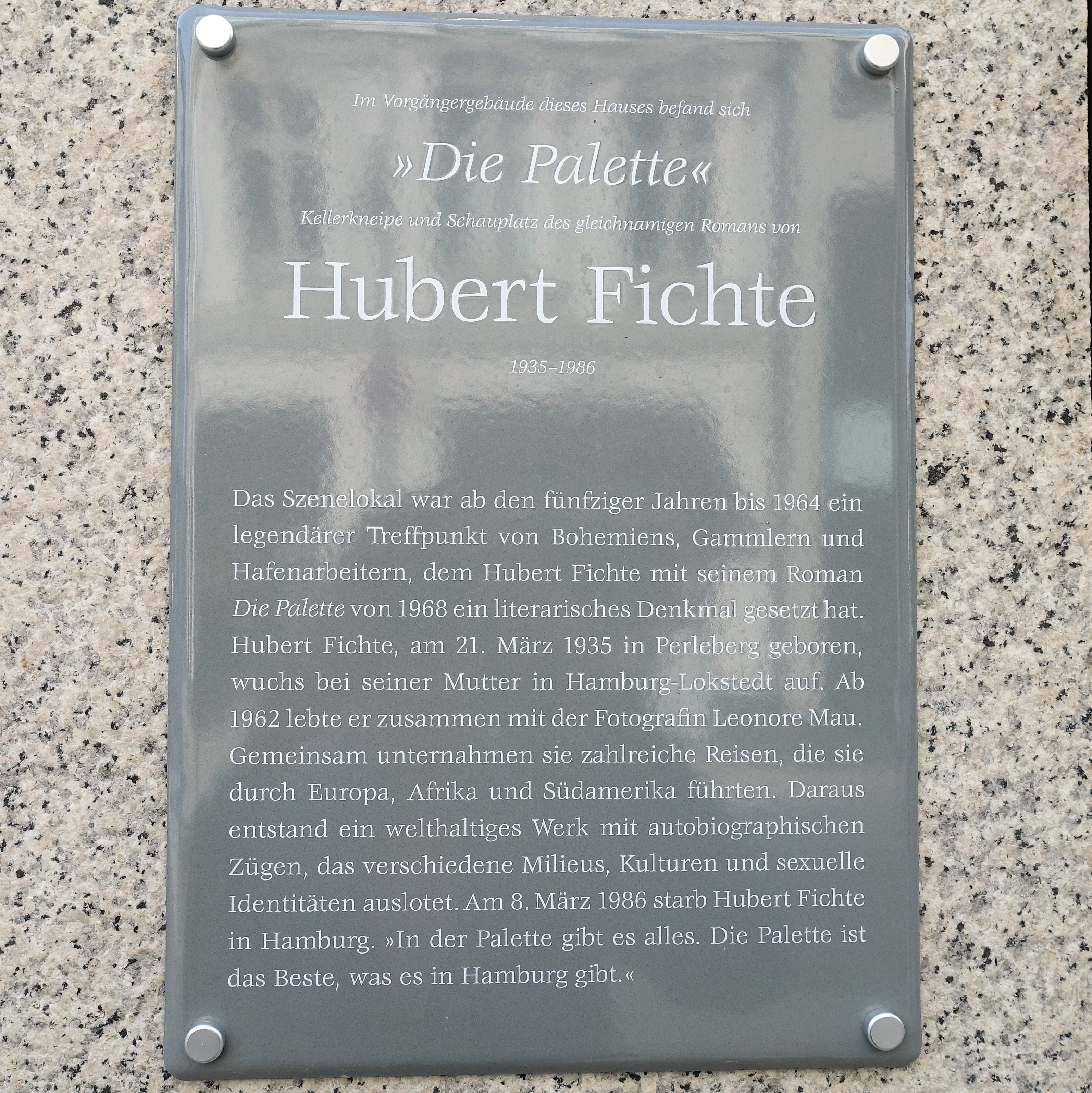 Plakette am Haus in der ABC-Straße in Hamburg zur Erinnerung an das Szenelokal Die Palette und Hubert Fichte